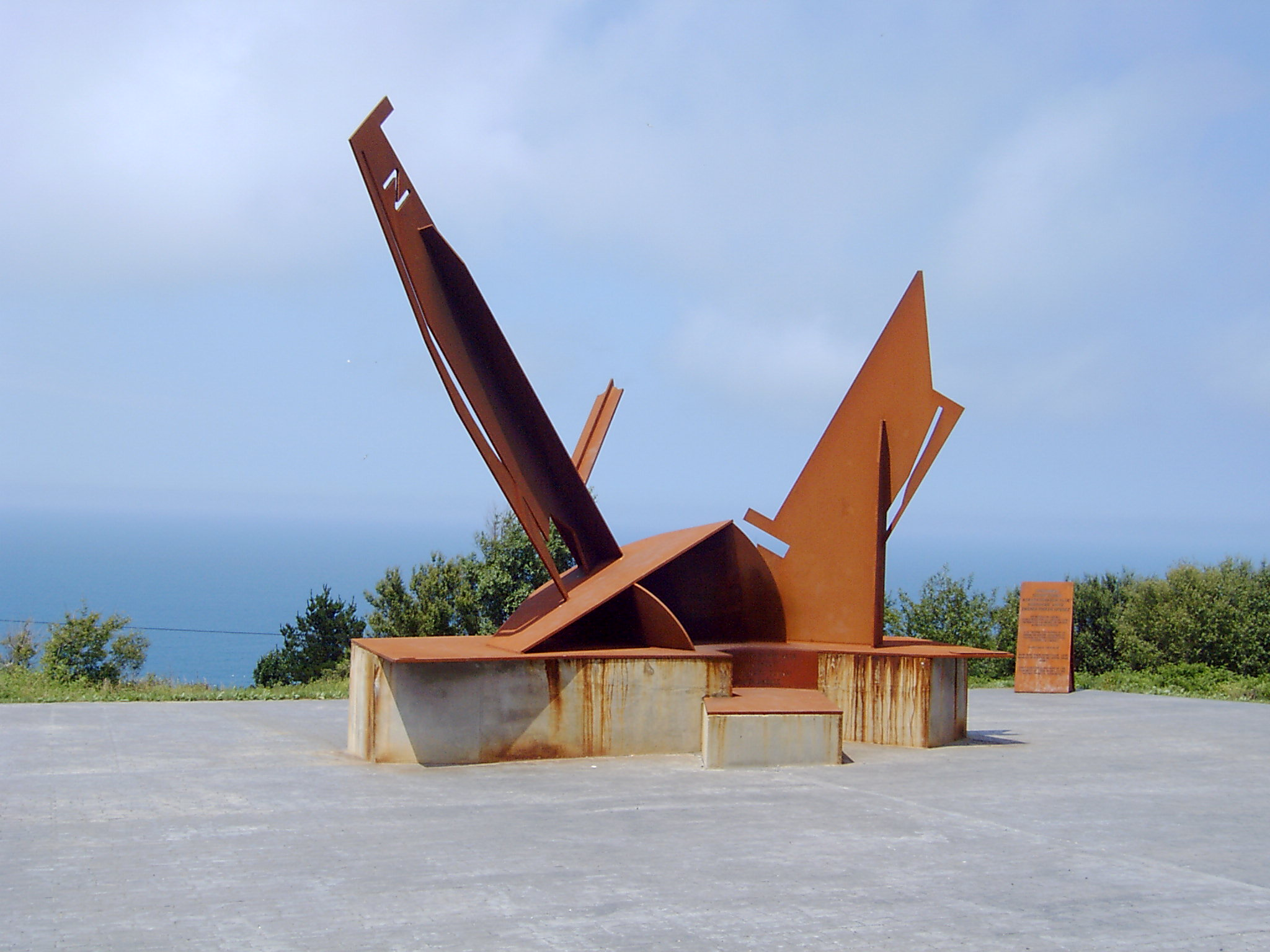 Matxitxako itsas batailako hildakoen omenezko eskultura